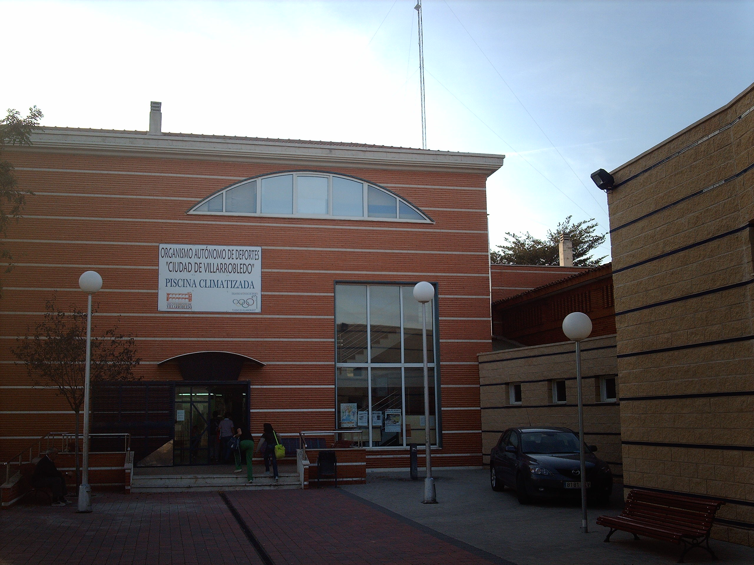 Piscina Cubierta de Villarrobledo (Albacete)